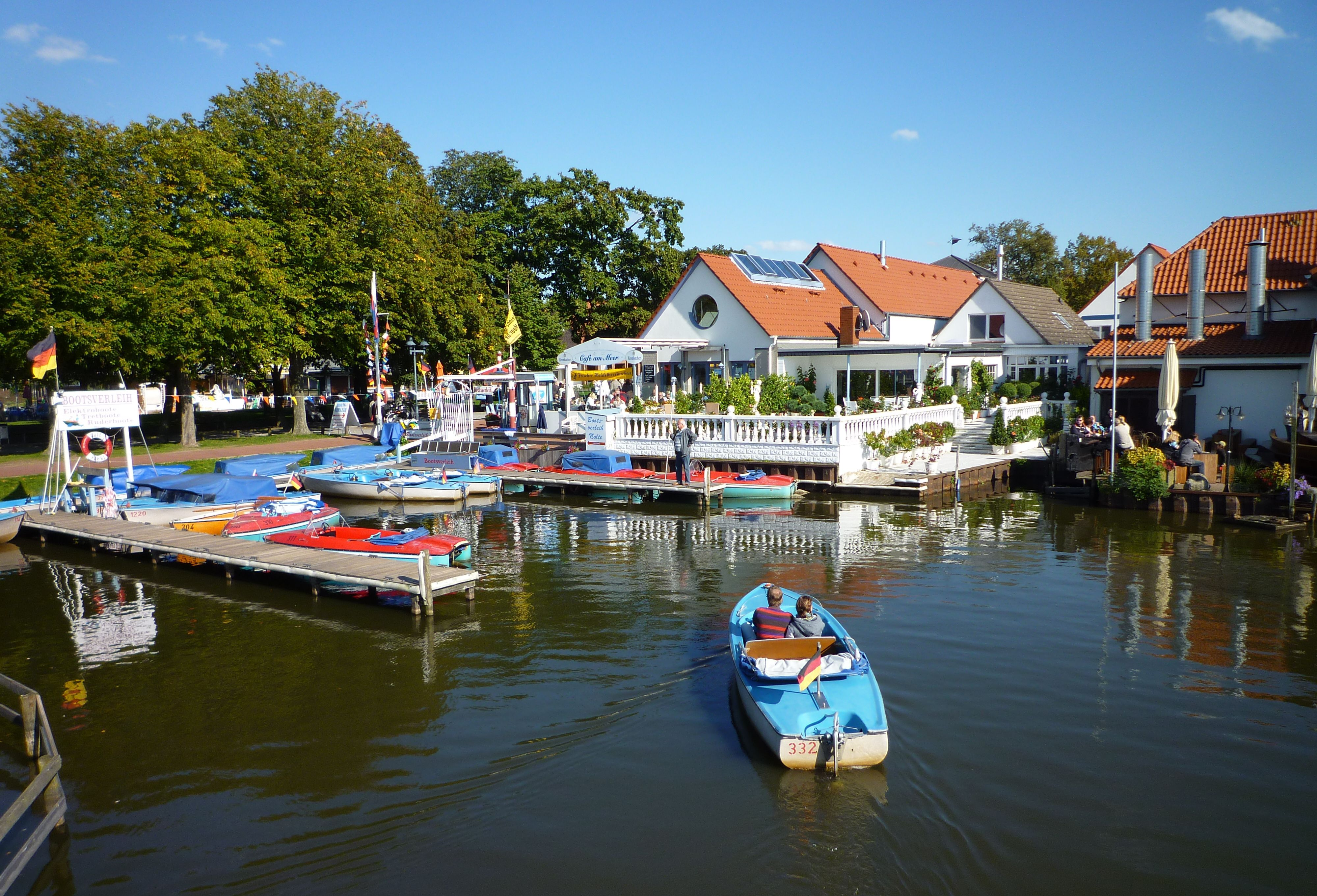 Wunstorf - Steinhude, Tretbootanleger